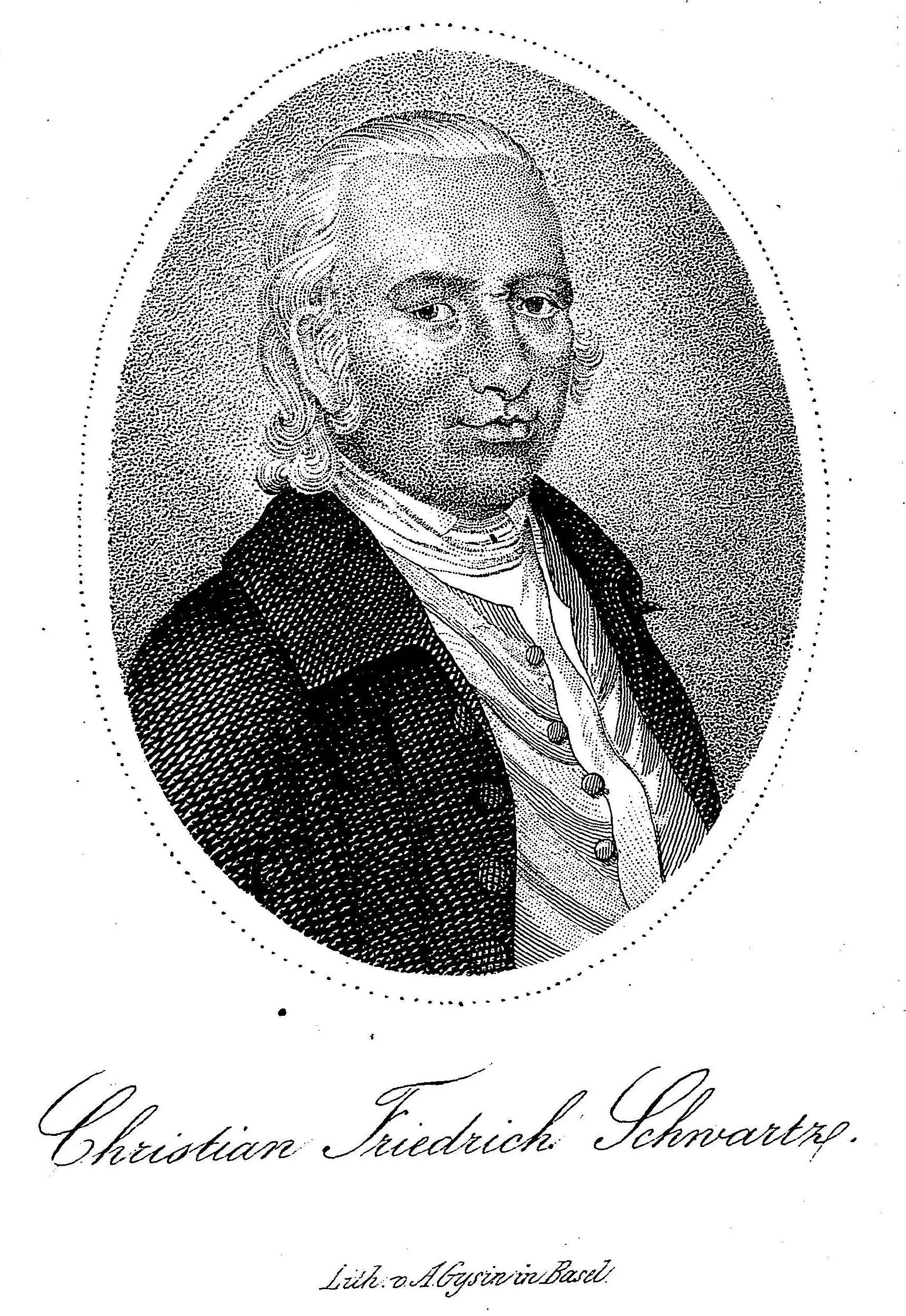 Frontispiz mit Porträt Christian Friedrich Schwartzs. Aus Hugh Pearson: Christian Friedrich Schwartz, der deutsche Missionar in Südindien. Aus dem Englischen von Christian Gottlieb Blumhardt, herausgegeben von W. Hoffmann, Basel 1846.